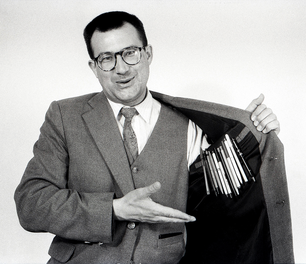 Üllar Luup, ajakirjanik 93